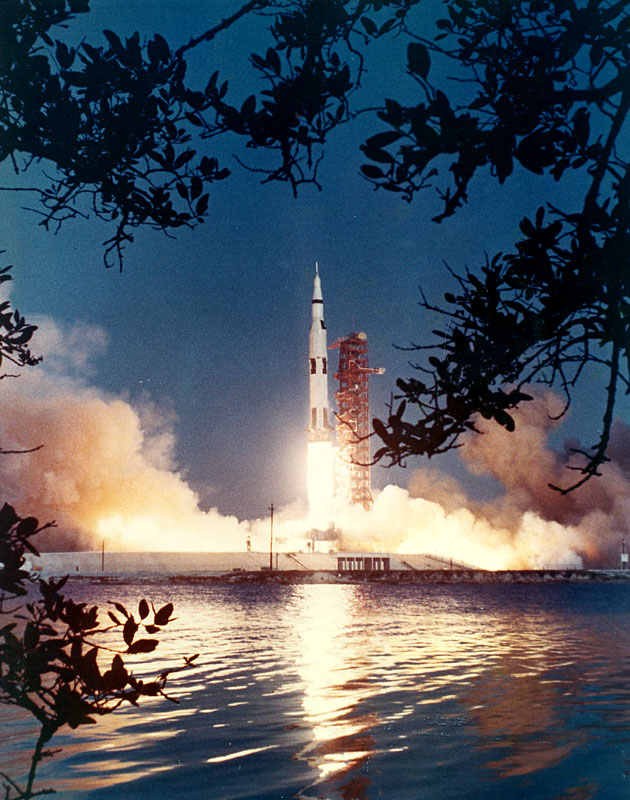 Start der Apollo 6